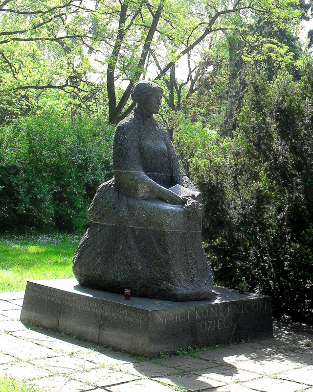 Warszawa, Ogród Saski